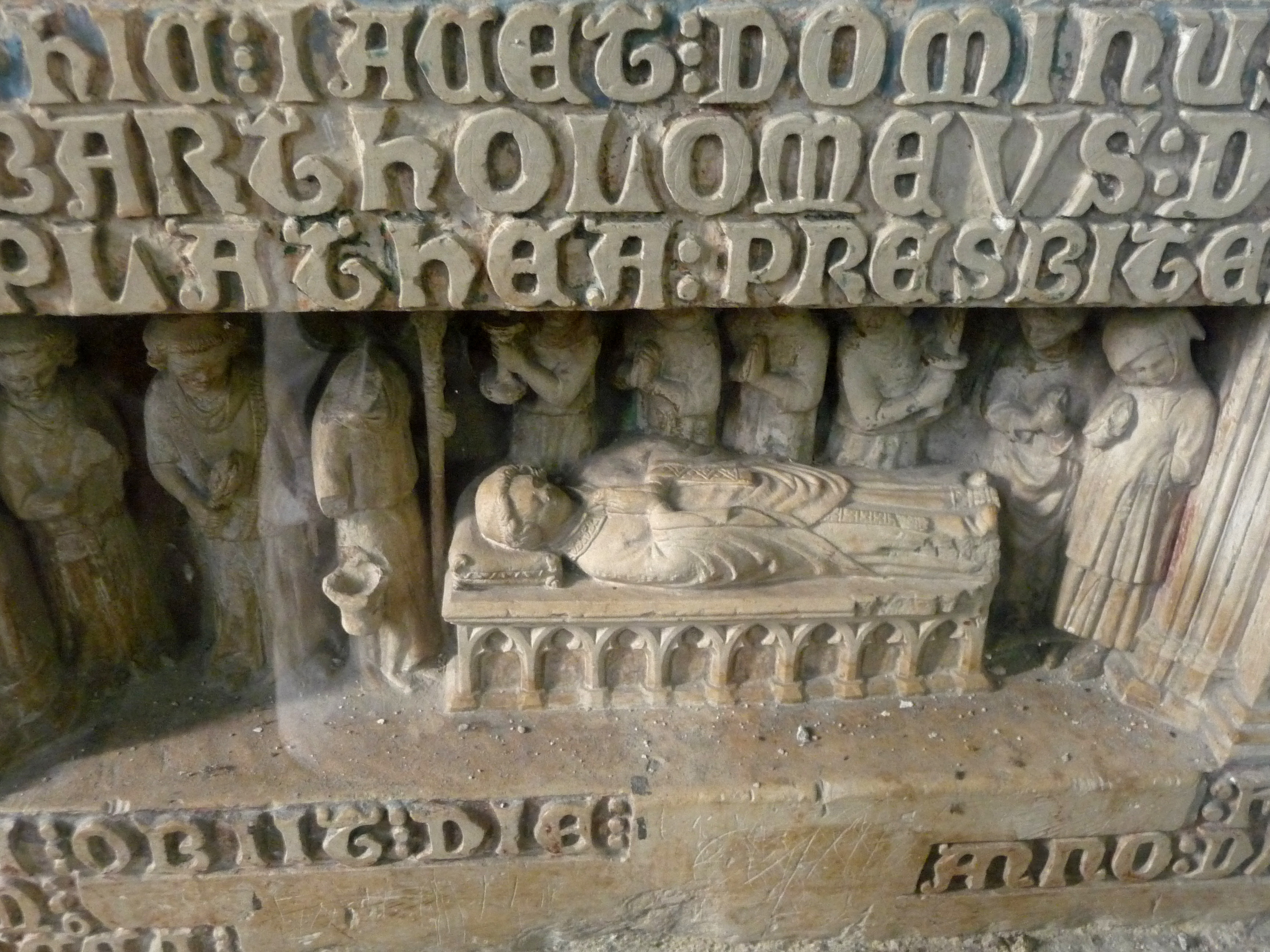 début du 14ème s Funérailles de Barthélémy de la Place